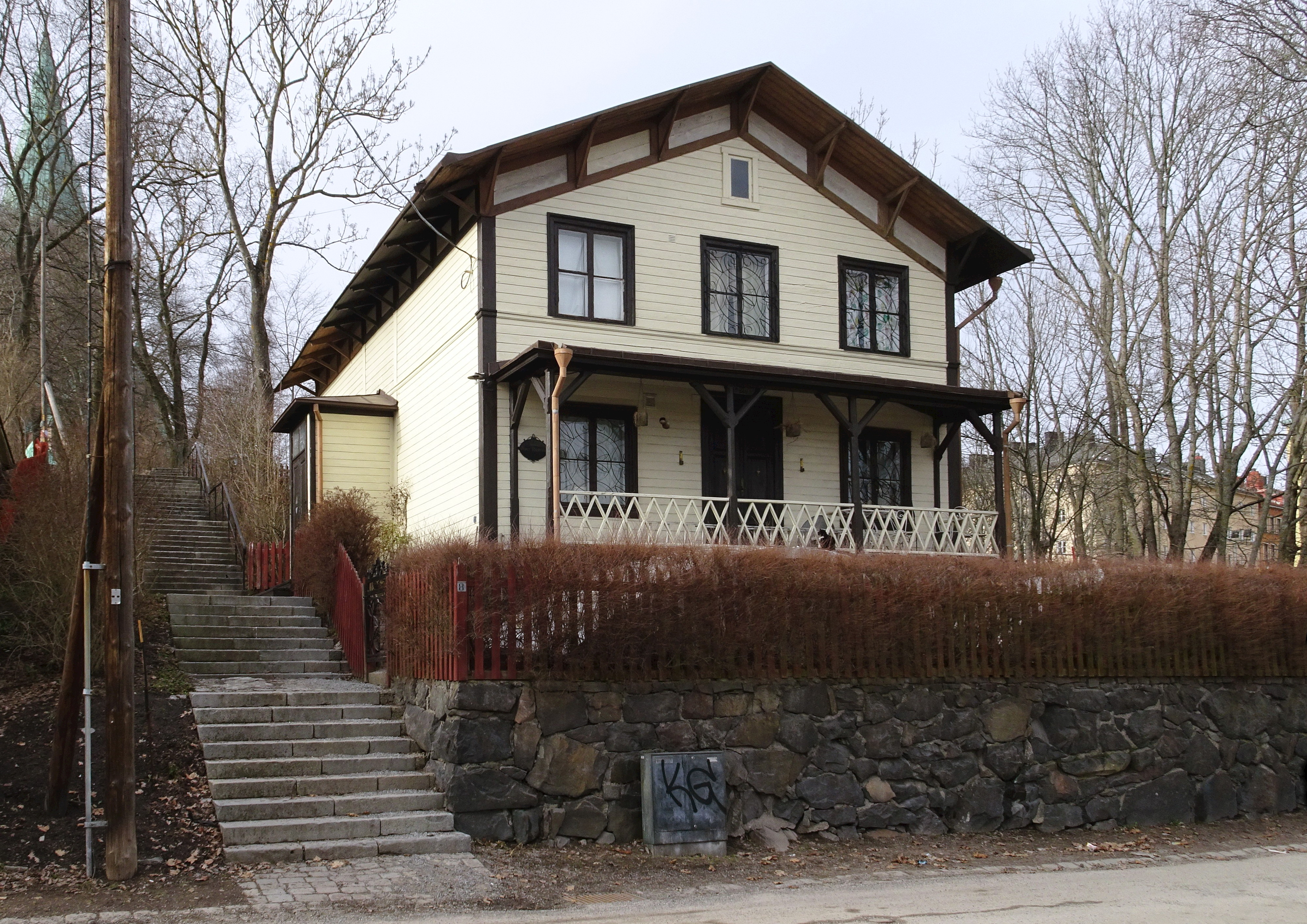 Stora Mejtens gränd 8 (f.d. Missionshyddan), fastigheten Stenkolet 2, arkitekt Axel och Hjalmar Kumlien.